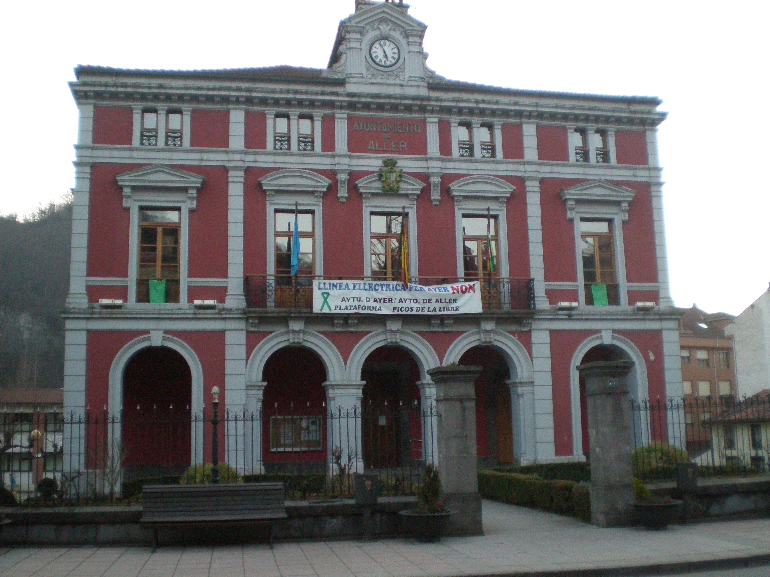 Casa conceyu d'Ayer